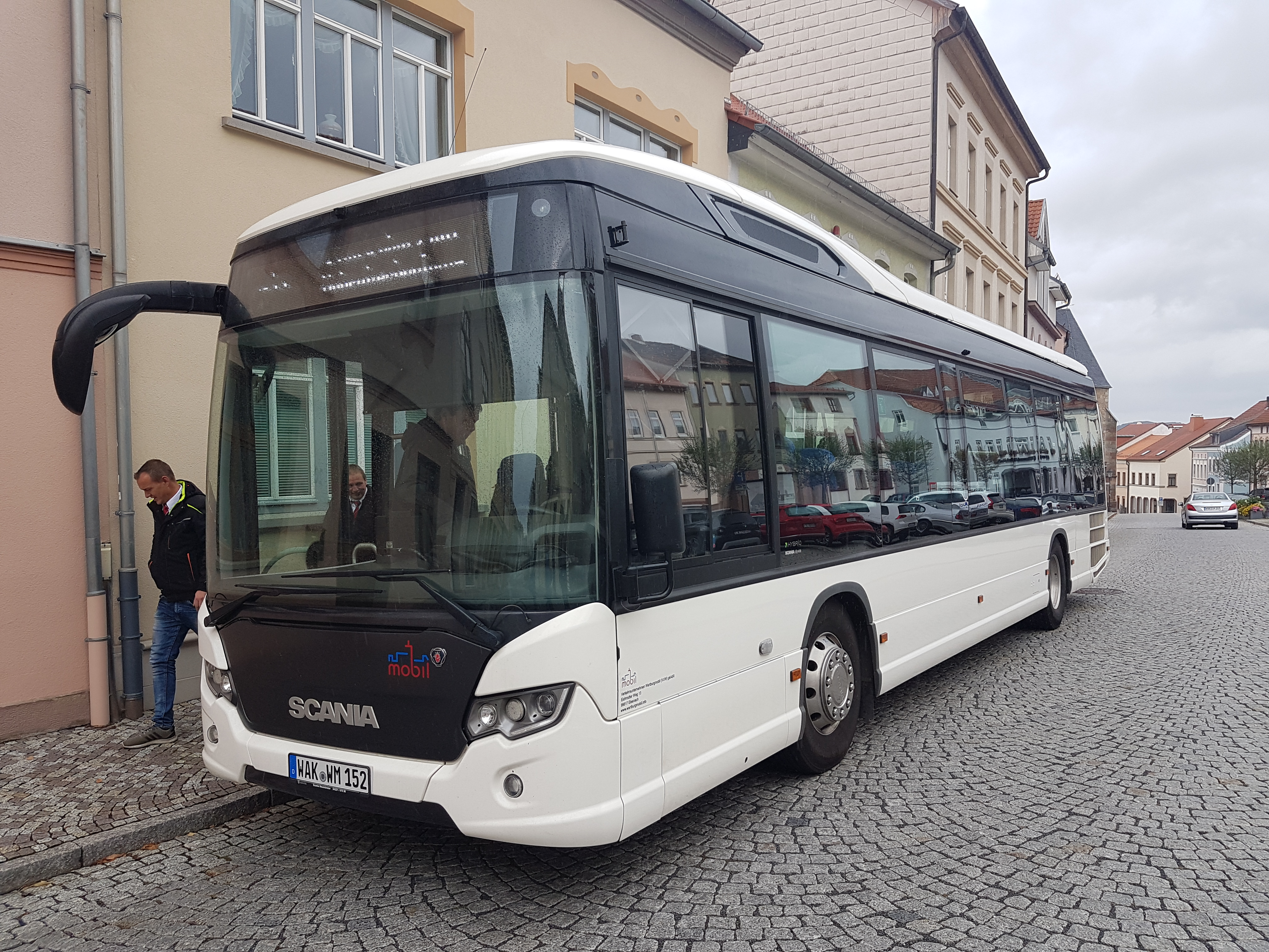 Scania Omnicity LE Hybrid Wartburgmobil am 9.10.19